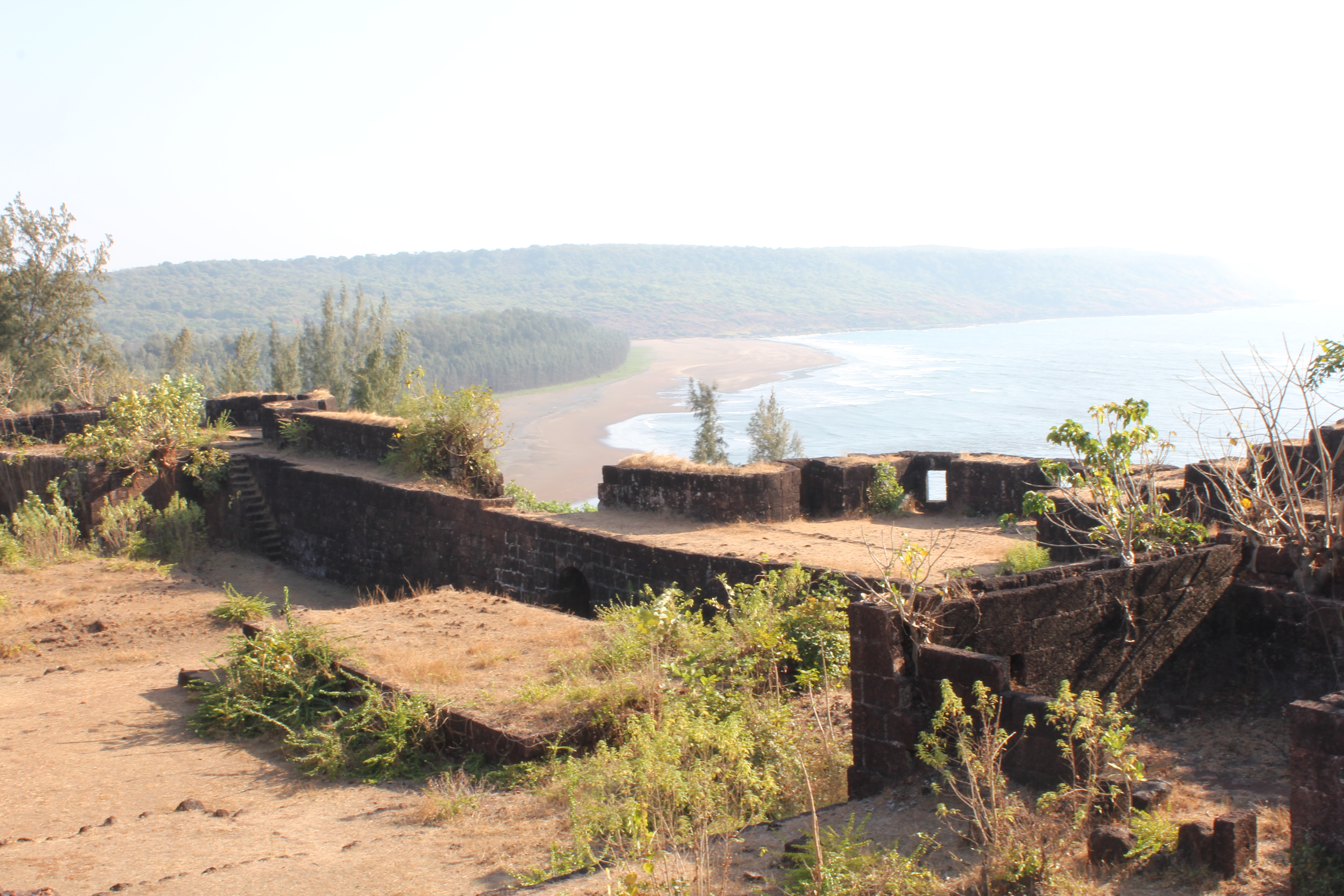 समुद्राचे दृश्य